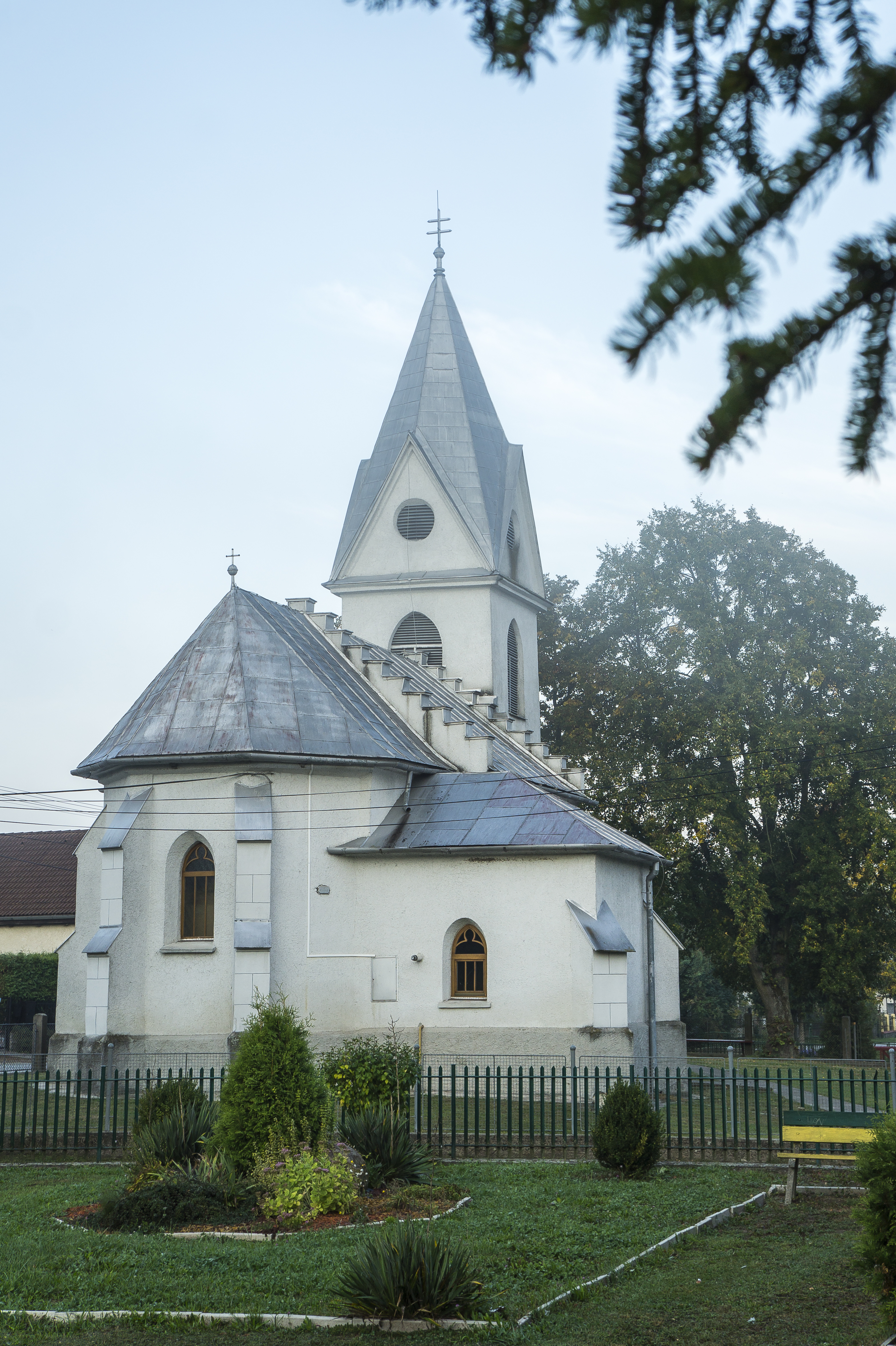 Kostol, Blažice.